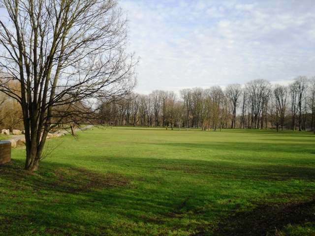 Le parc de l'Arbalète à Grigny (91)